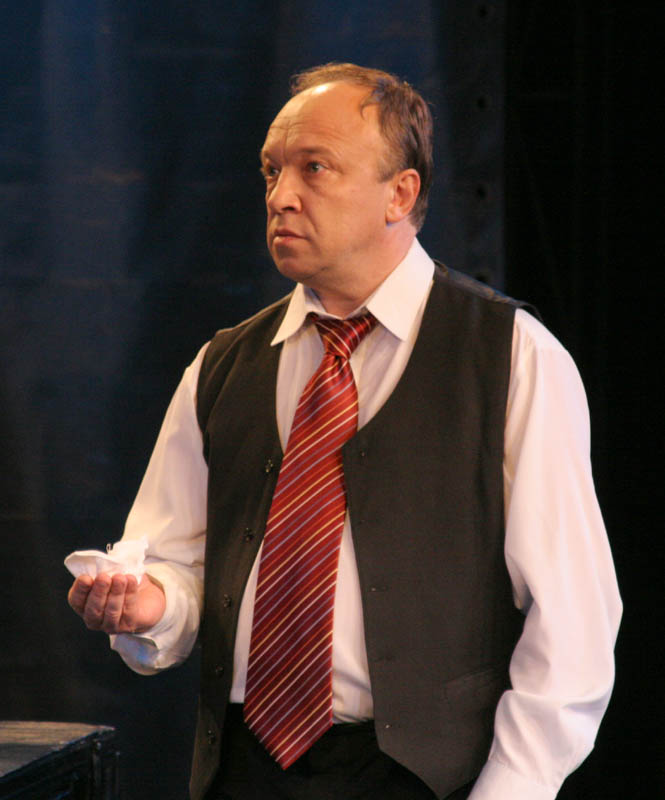 Актёр Саратовского академического театра драмы Владимир Назаров в спектакле «Записки сумасшедшего»